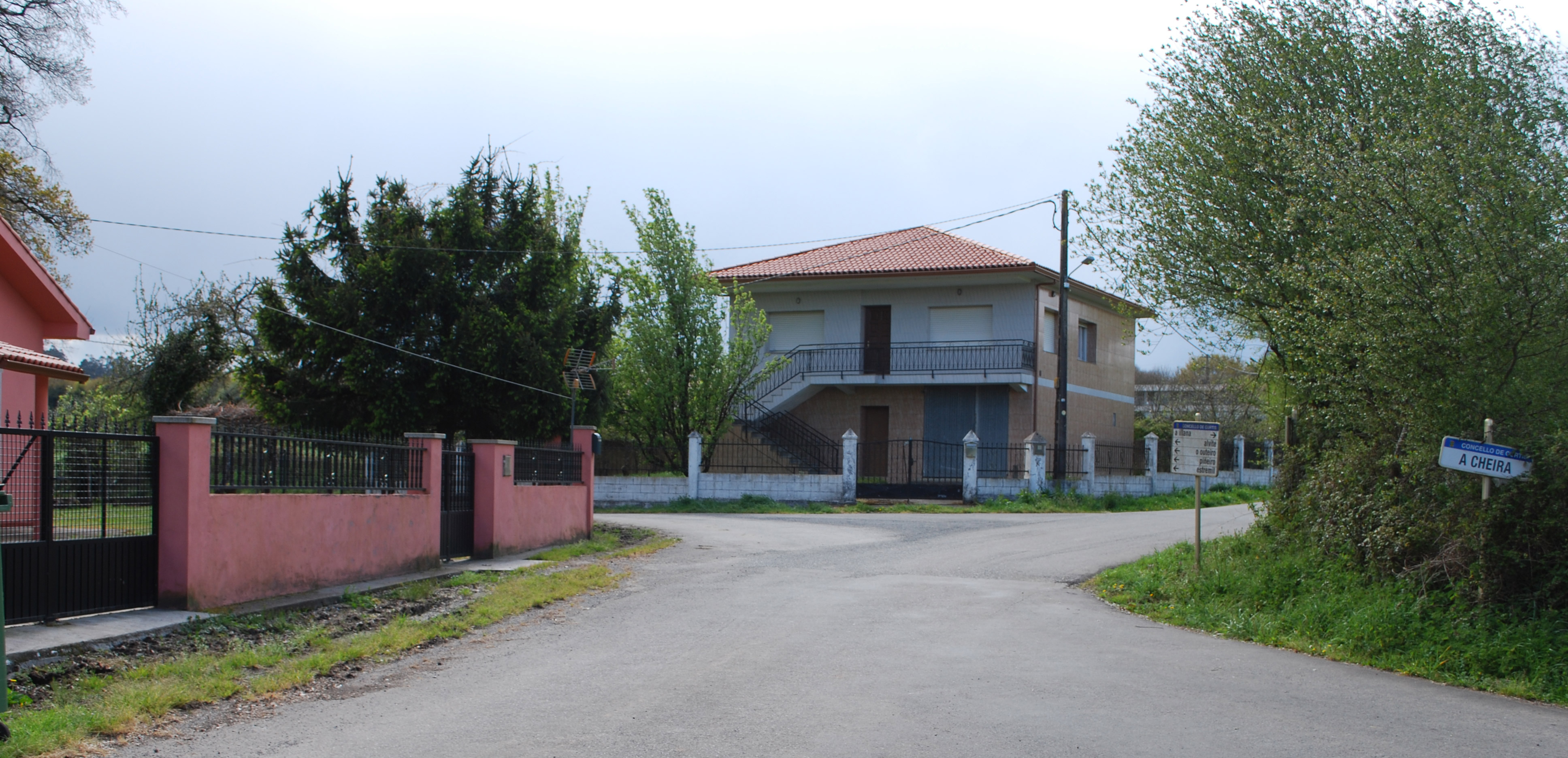 Vista da Cheira, Fisteus Concello de Curtis A Coruña Galiza Spain